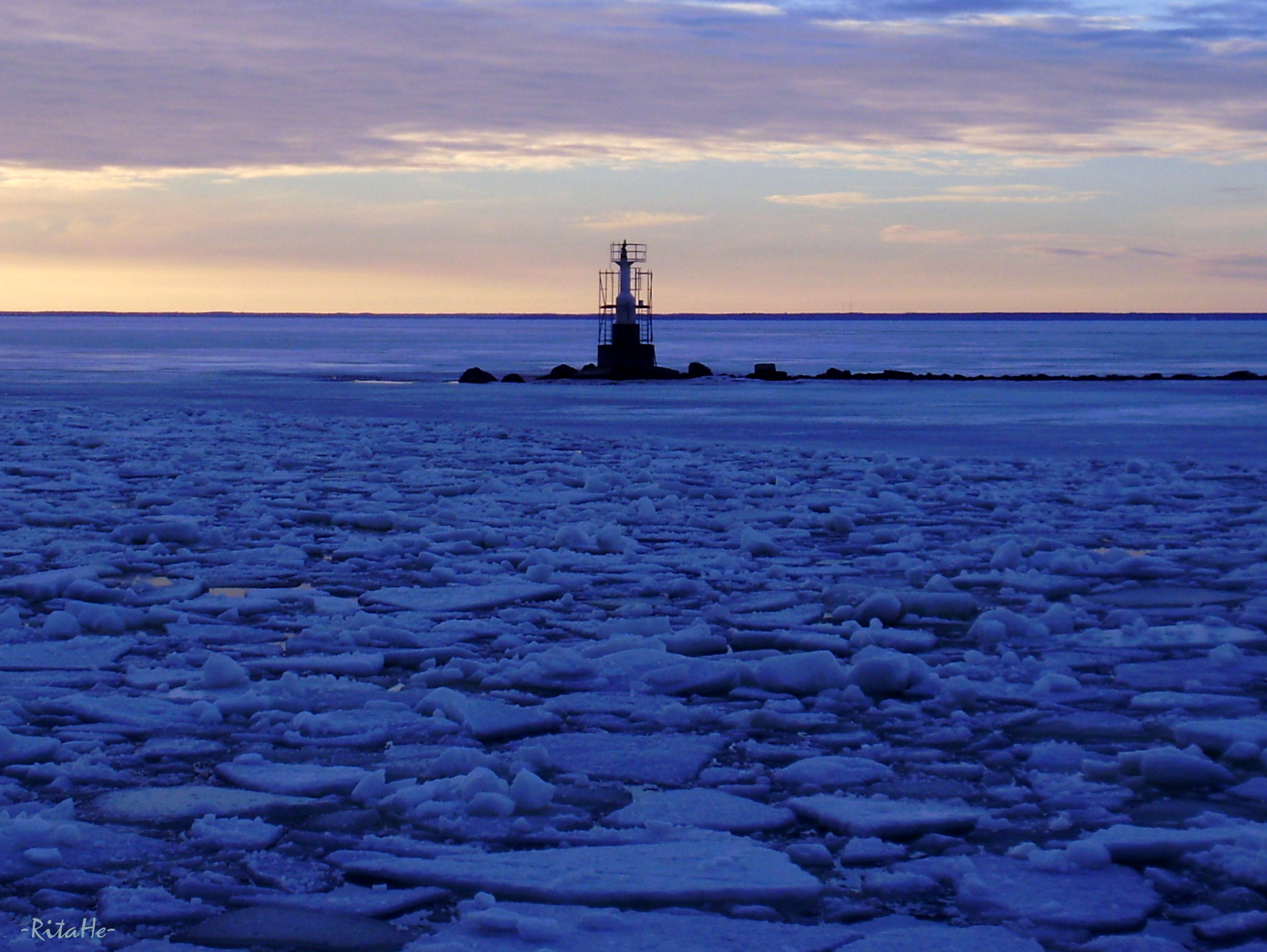 Varakevadine jääminek Rohukülas (Rohuküla sadama muul, Ridala vald Rohuküla). Pildistatud 5.aprillil 2011.